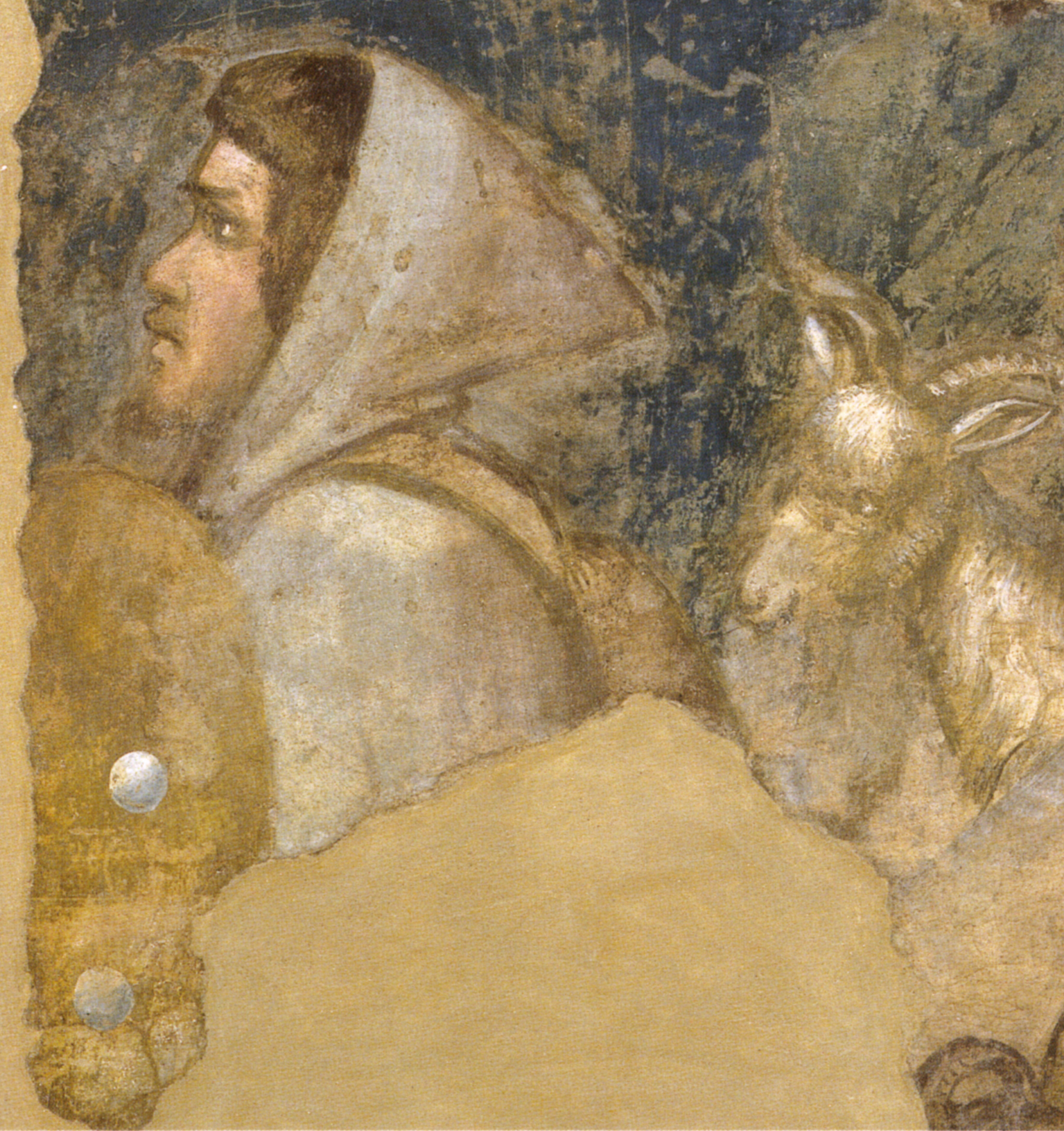 Giotto, frammento dalla badia fiorentina